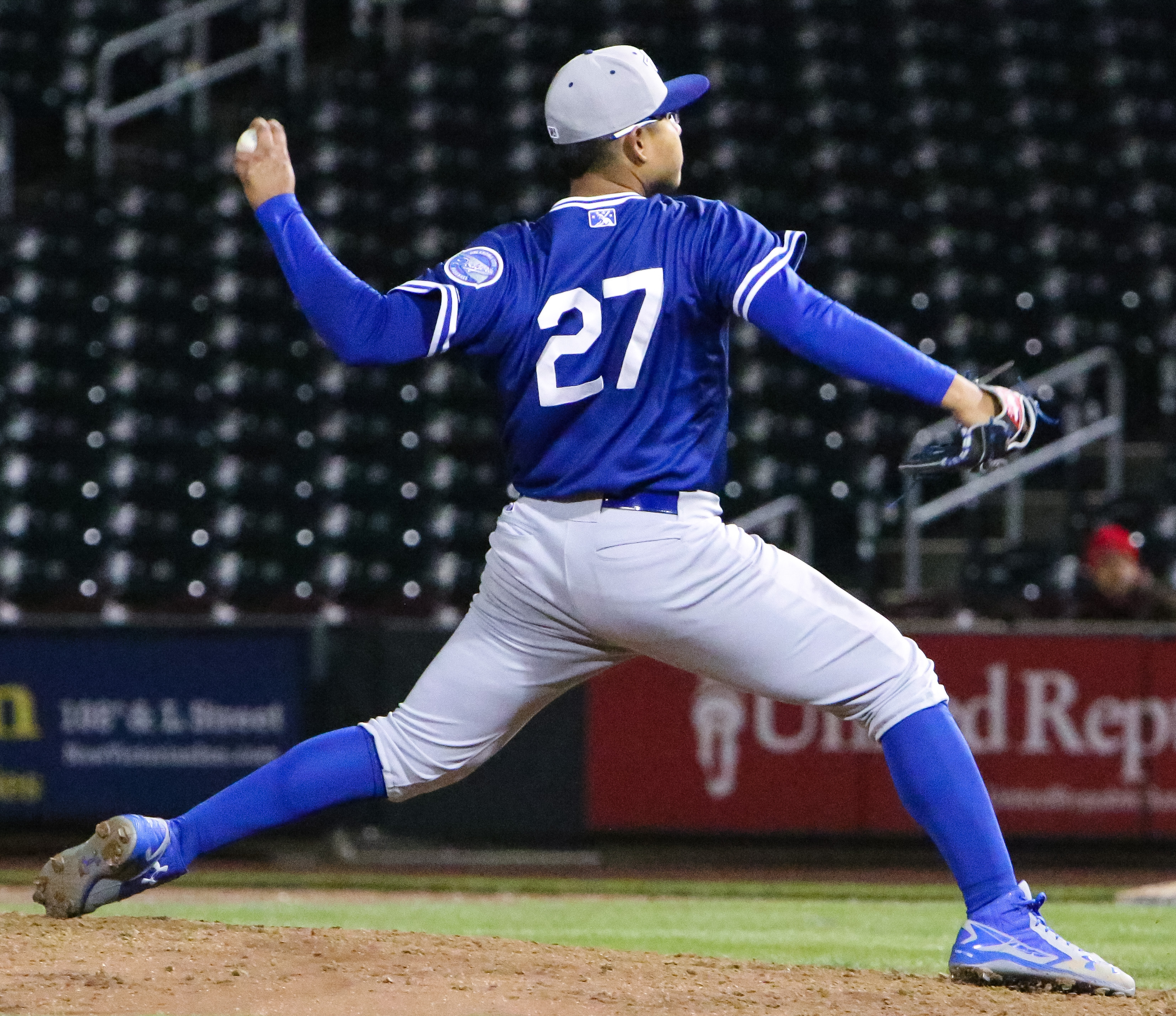 Julio Urías